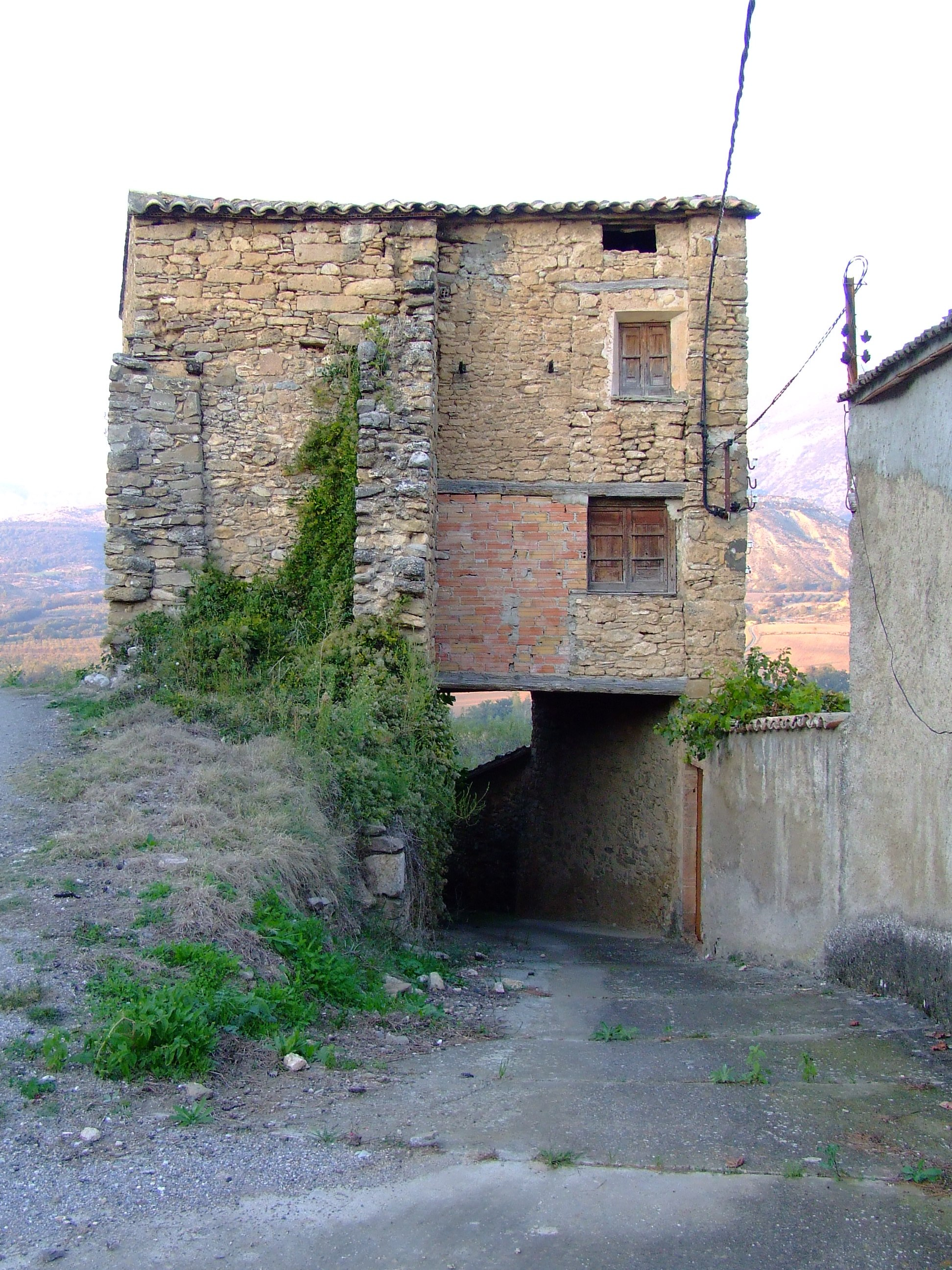 Restes del castell de Sant Romà d'Abella (Isona i Conca Dellà, Pallars Jussà)